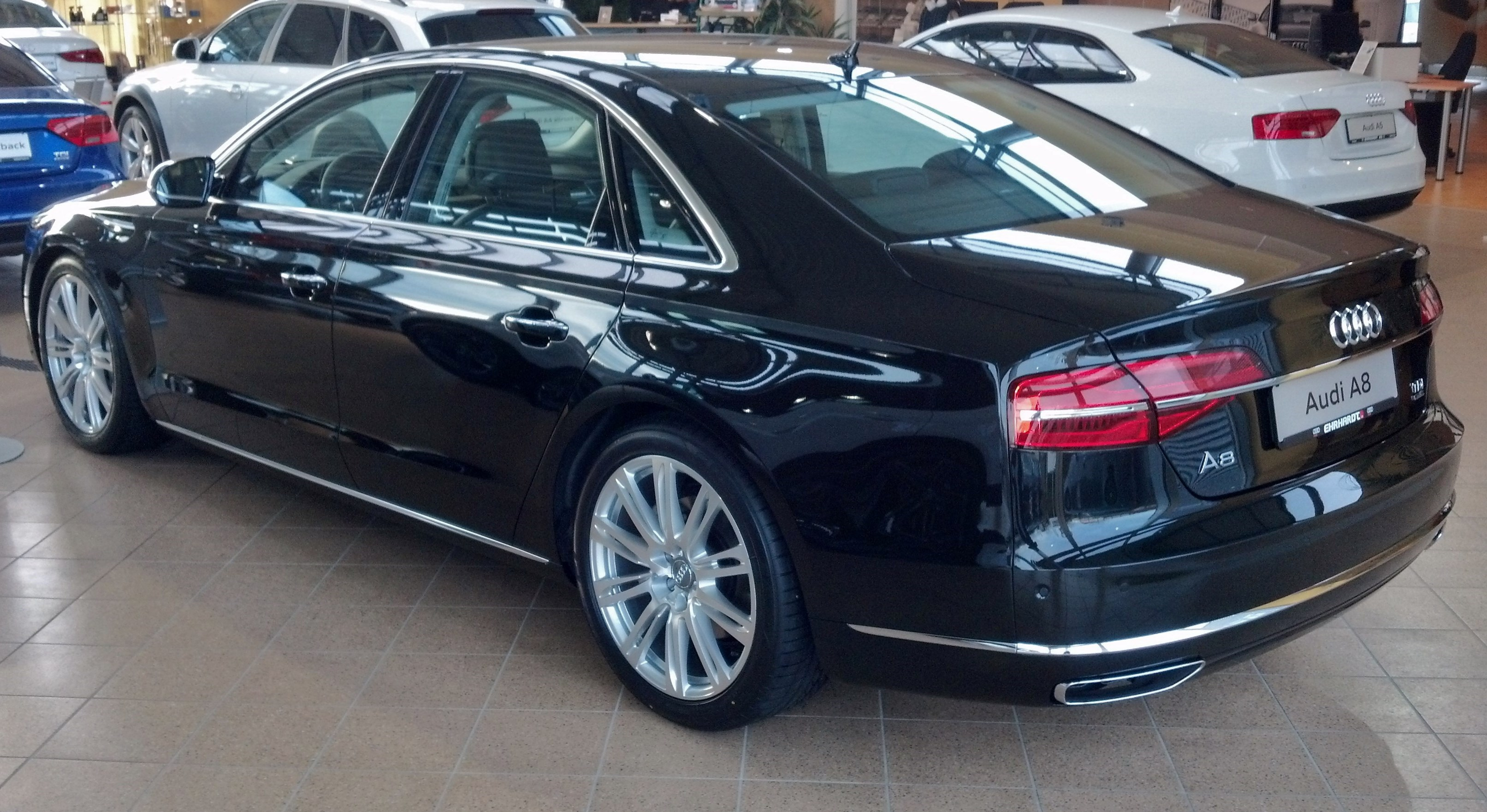 Audi A8 Facelift